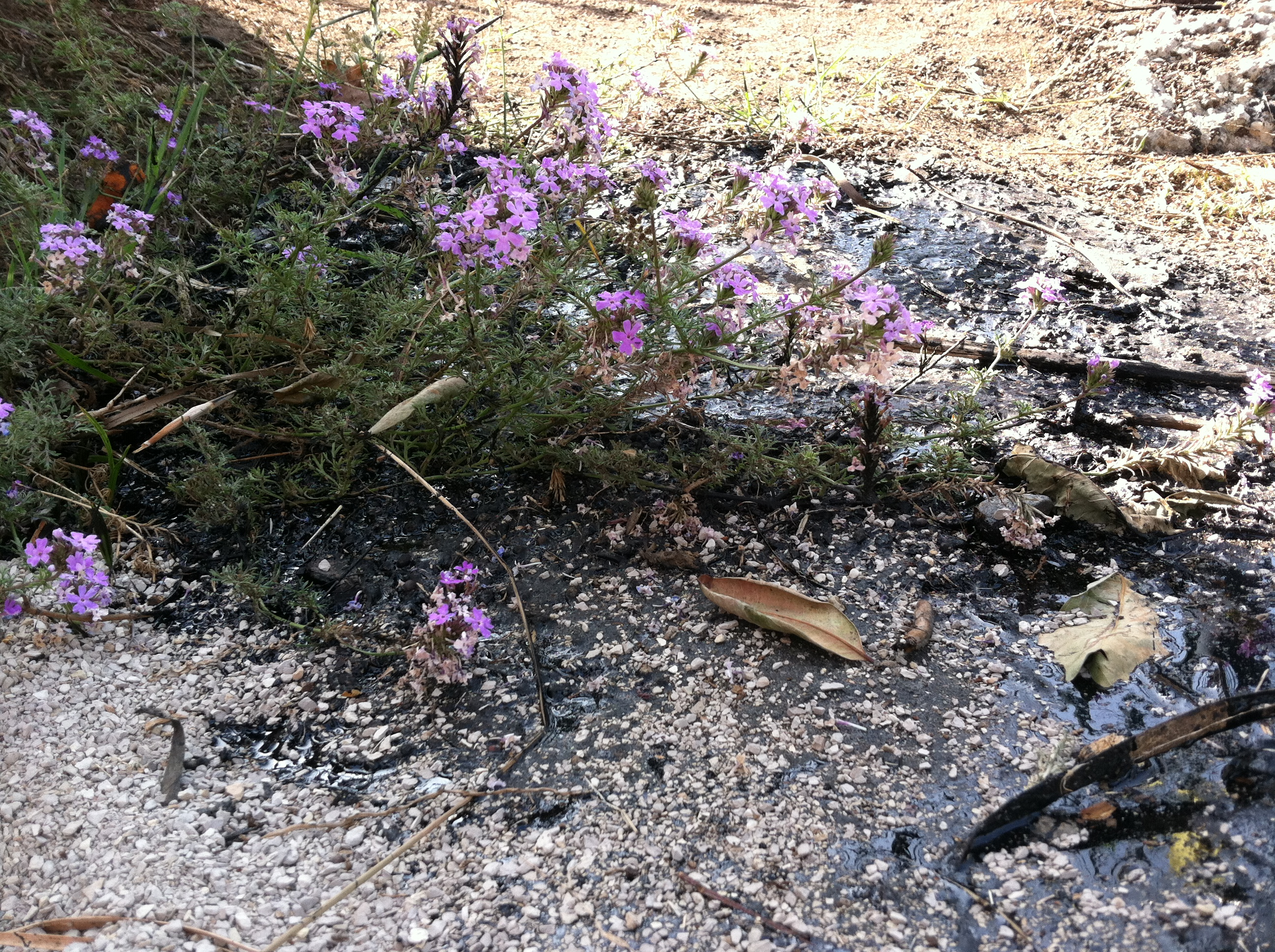 La Brea tar pit